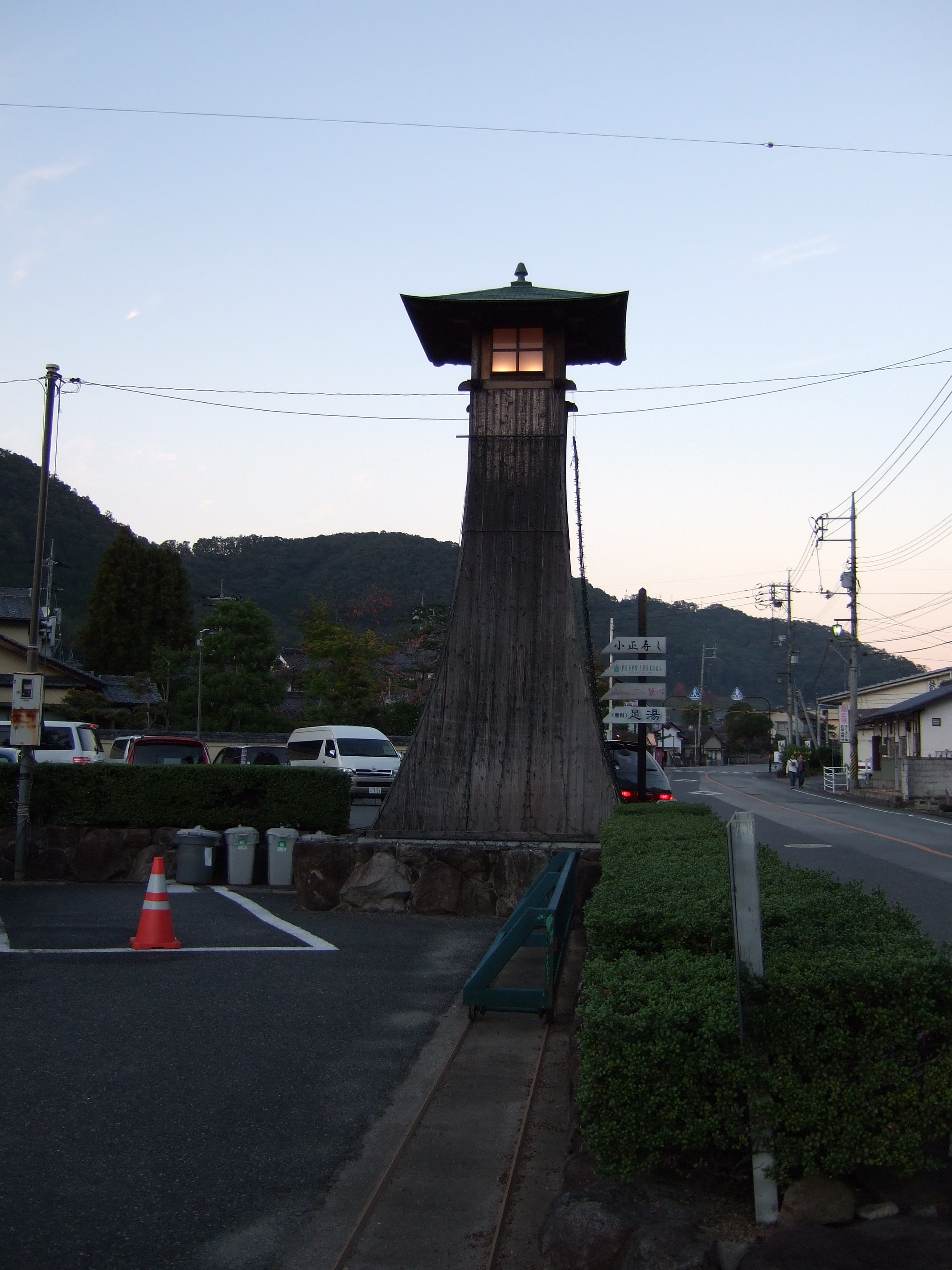 湯郷